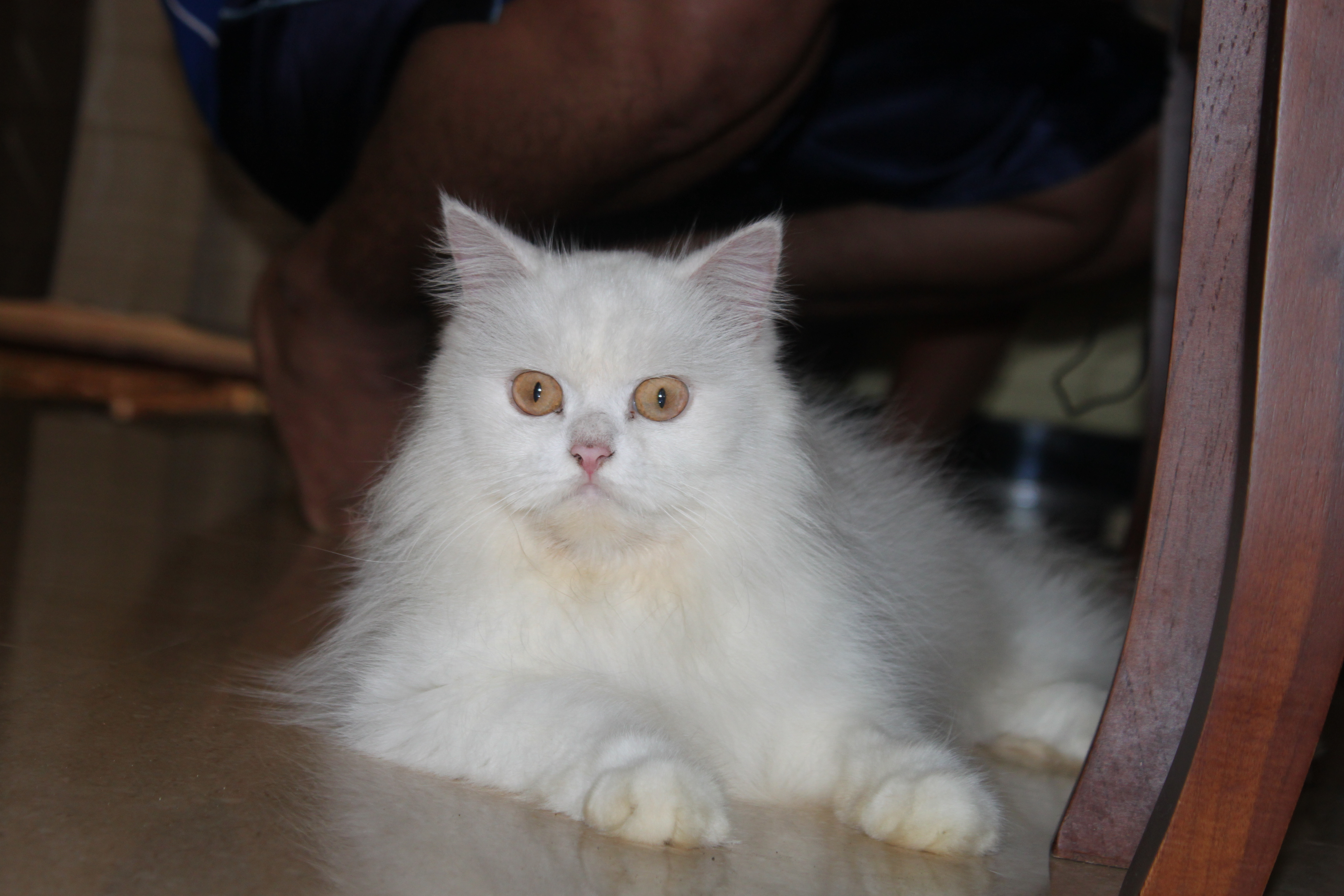 Kucing Persia